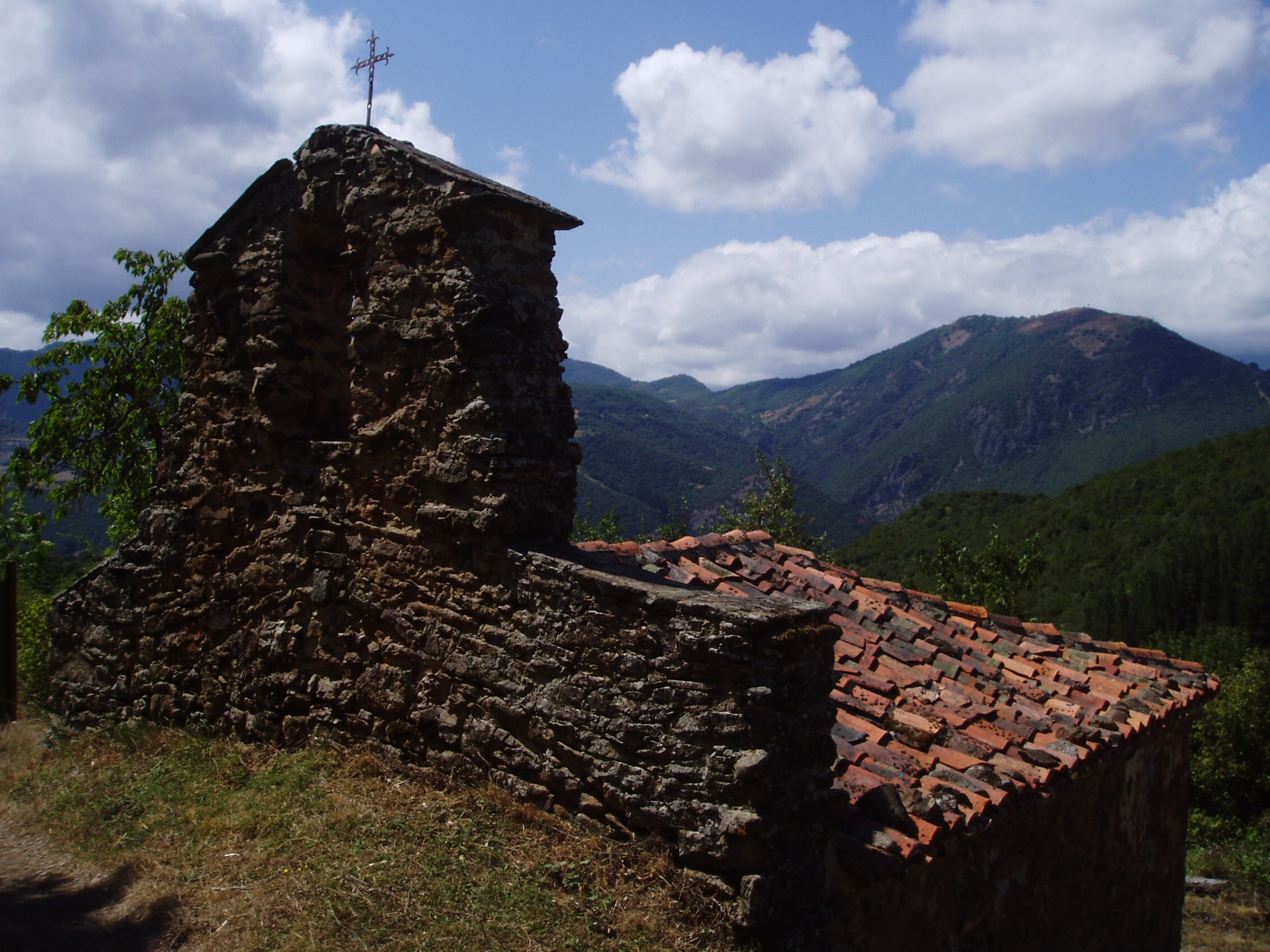 Ermita de Nuestra Señora de las Nieves. Porcieda. Liébana. Cantabria